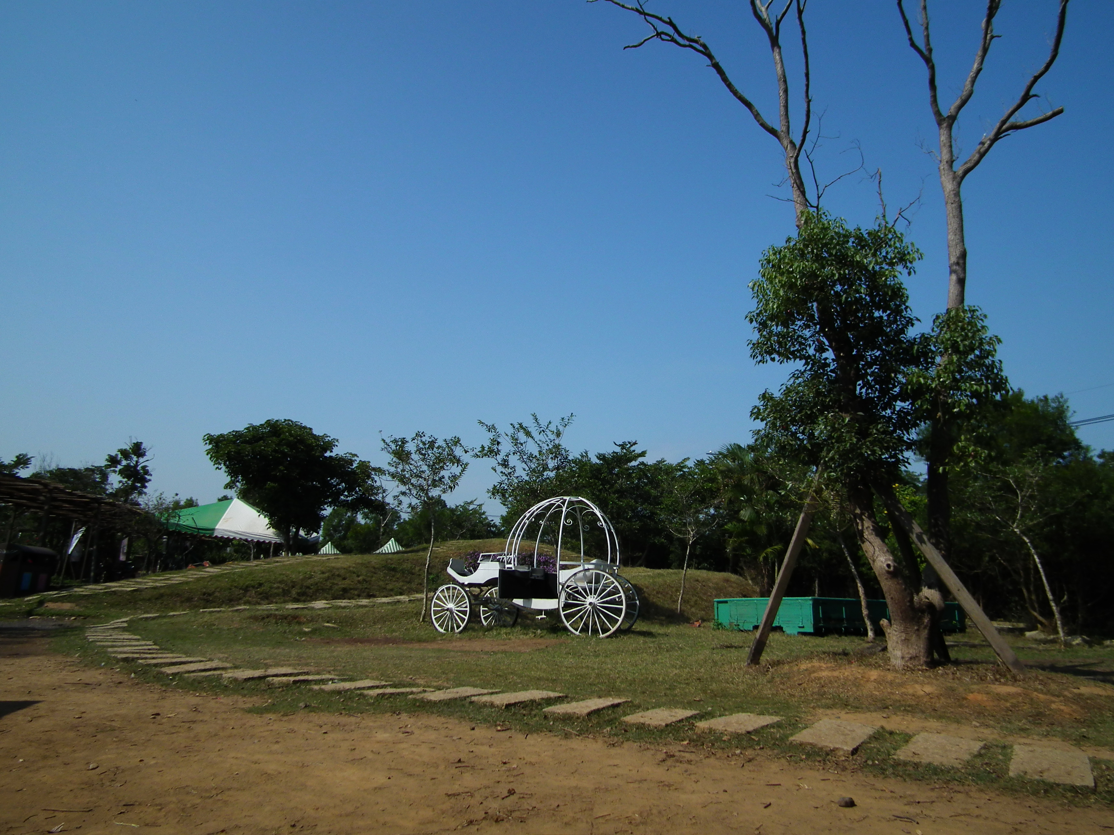 Pegasus Ranch 天馬牧場